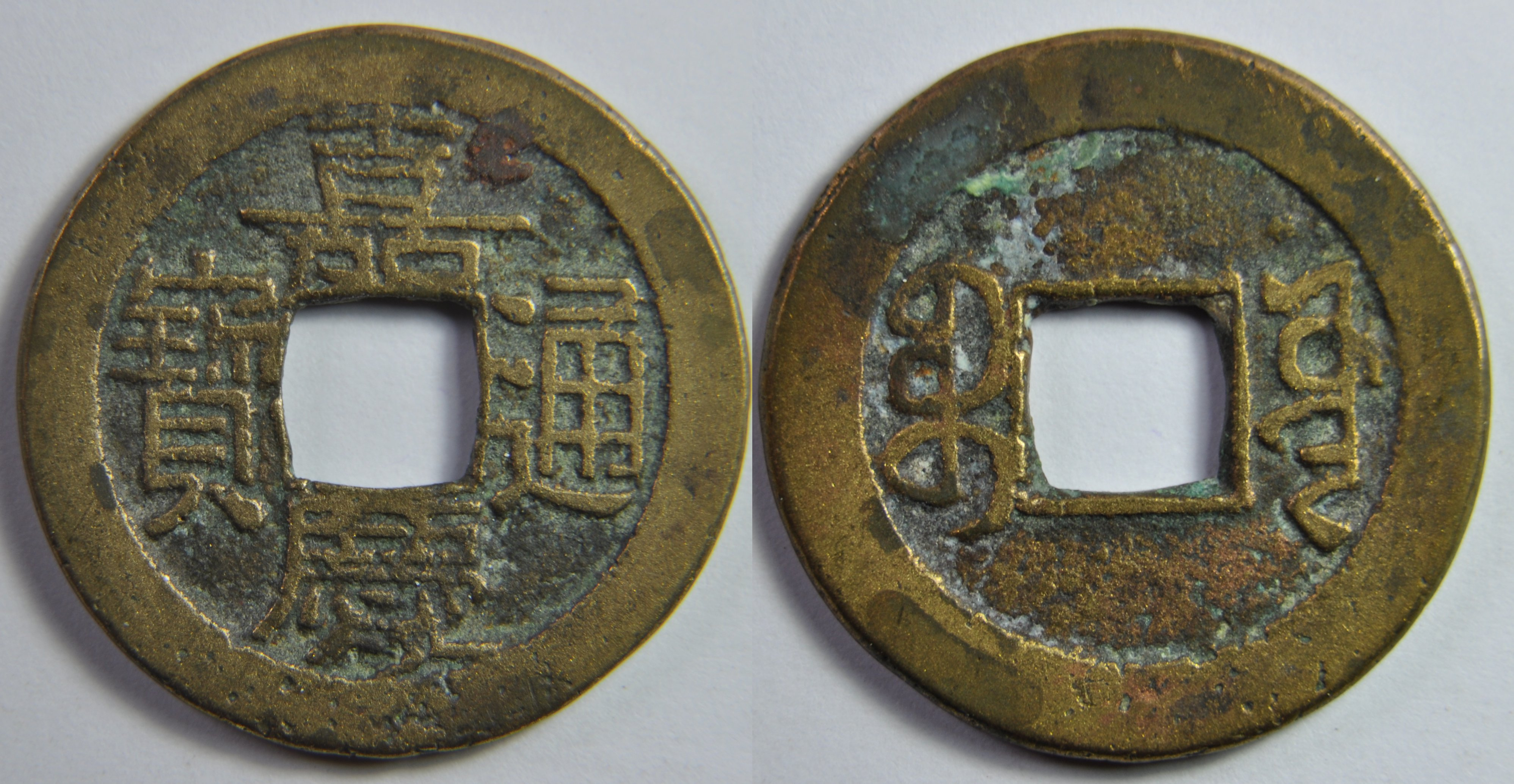 Une monnaie en laiton d'une sapèque (1 cash) de l'empereur Ren Zong (1796-1820), ère Jia Qing de la dynastie Qing (1644-1912) de l'atelier du ministère des Travaux Publics. A/ Jia Qing tong bao (Monnaie courante de Jia Qing) R/ Boo yuwan ; petit point à droite au-dessus de yuwan Dimension : 24,24 mm Poids : 3,7 g. Référence : aucune. L'avers est du type H22.482, le revers du type H22.489 plus le point. Indice de rareté : 12 ? (Difficile d'évaluer car elle n'est représentée dans aucun catalogue que j'ai en ma possession.)